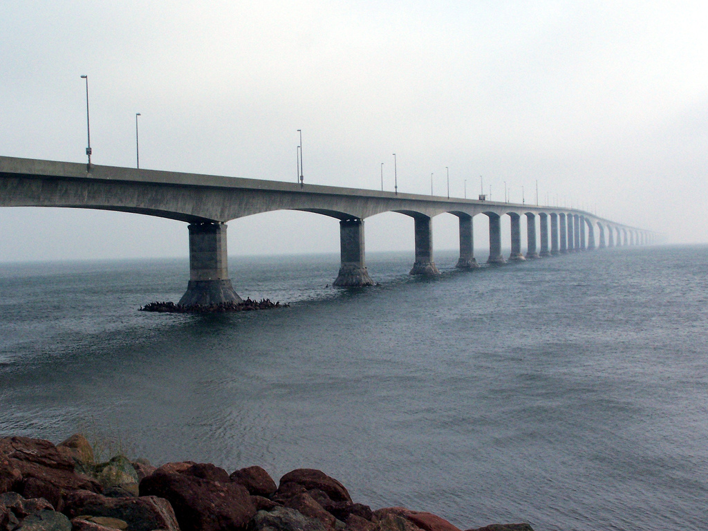 Konföderationsbrücke